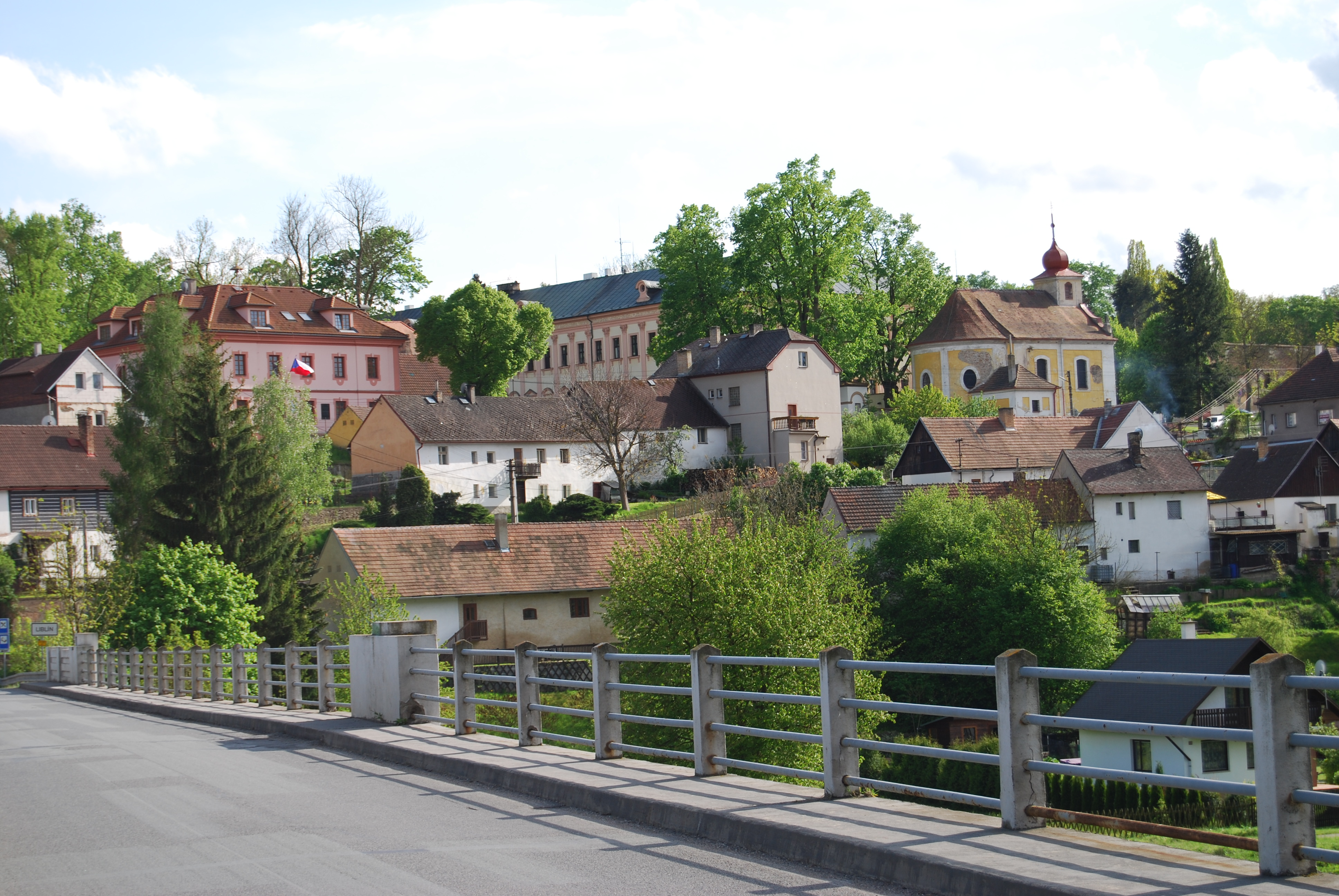 Liblín je vesnice v okrese Rokycany, kraj Plzeňský. Česká republika.